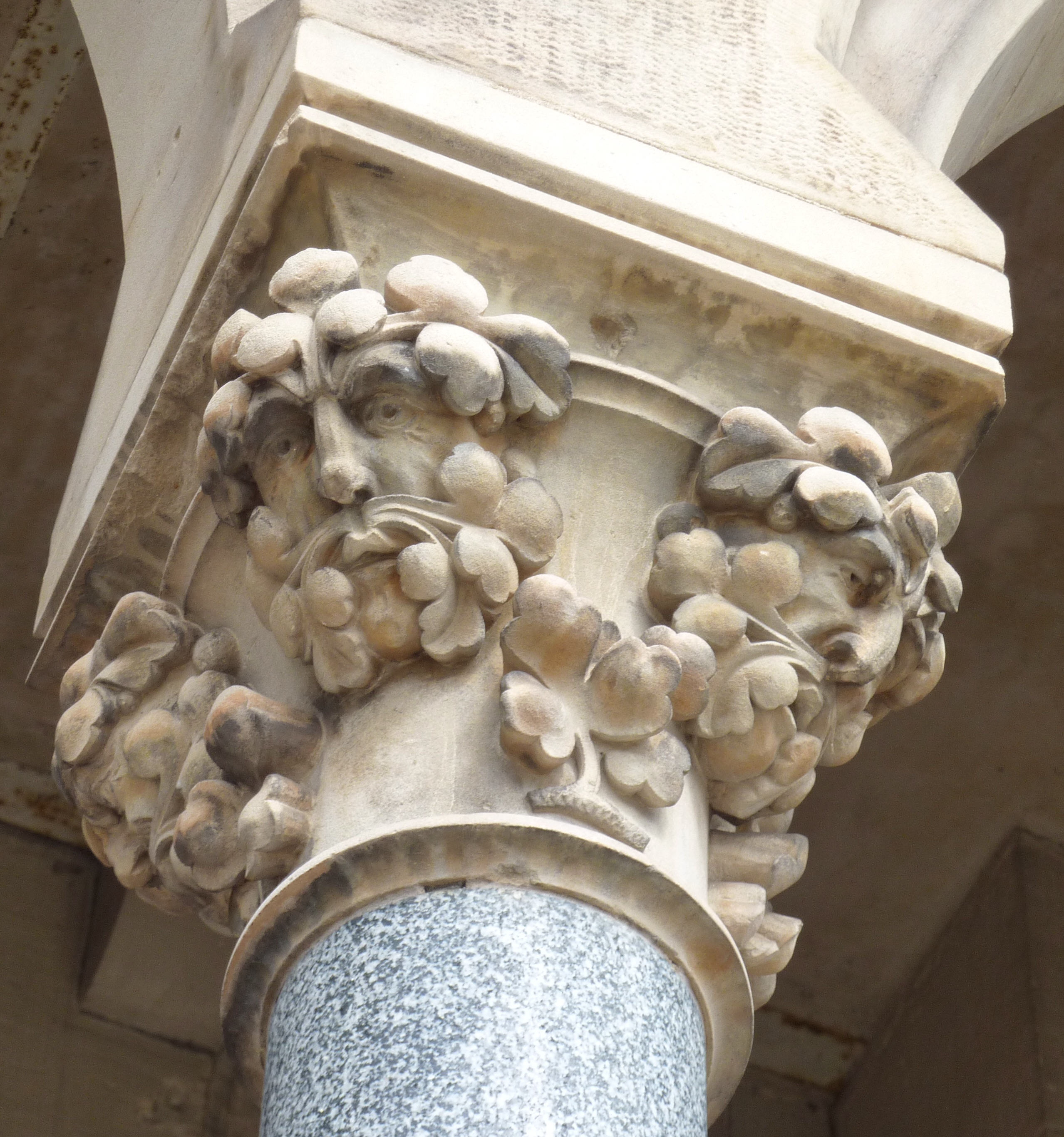 Kapitell im Eingangsbereich von St. Ludwig